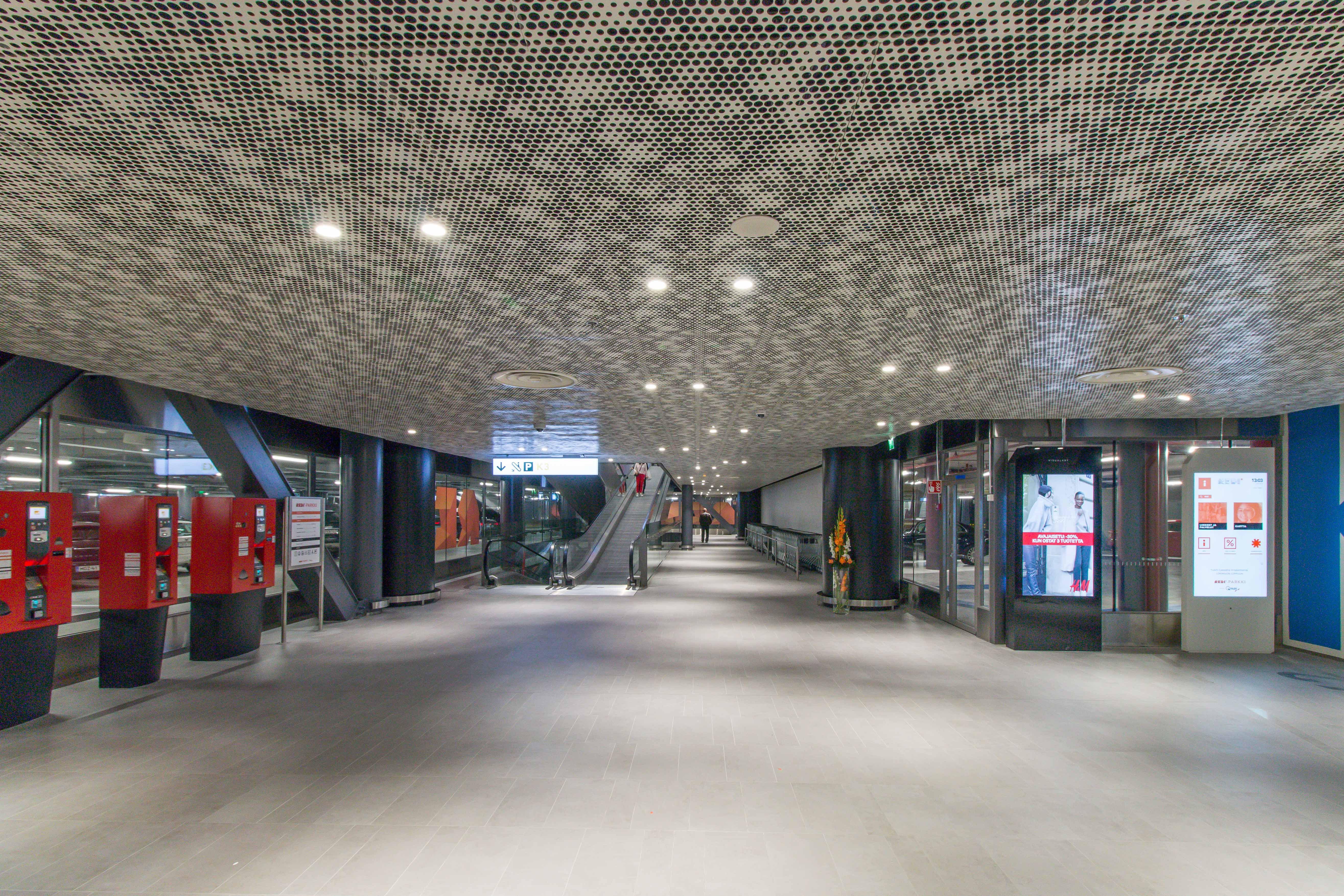 Redin alakatoista löytyy muun muassa erikois-perforoituja kasetteja, viiluverhousta ja akustista ruiskutusta